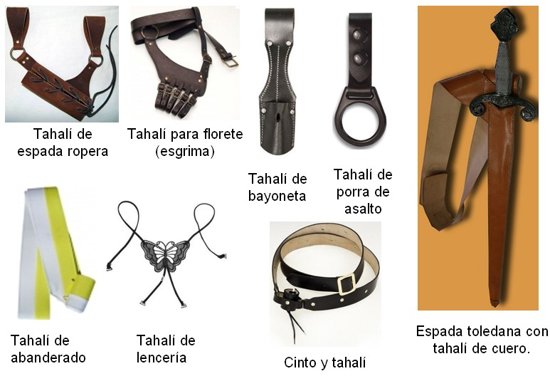 Tipos de tahalí según su uso. (ver pies de imagen) Sinónimos y pares léxicos: Tira, correa, cinto o cinturón, portacaja, portaespadas, arnés, bandolera, charpa, trena, talay.